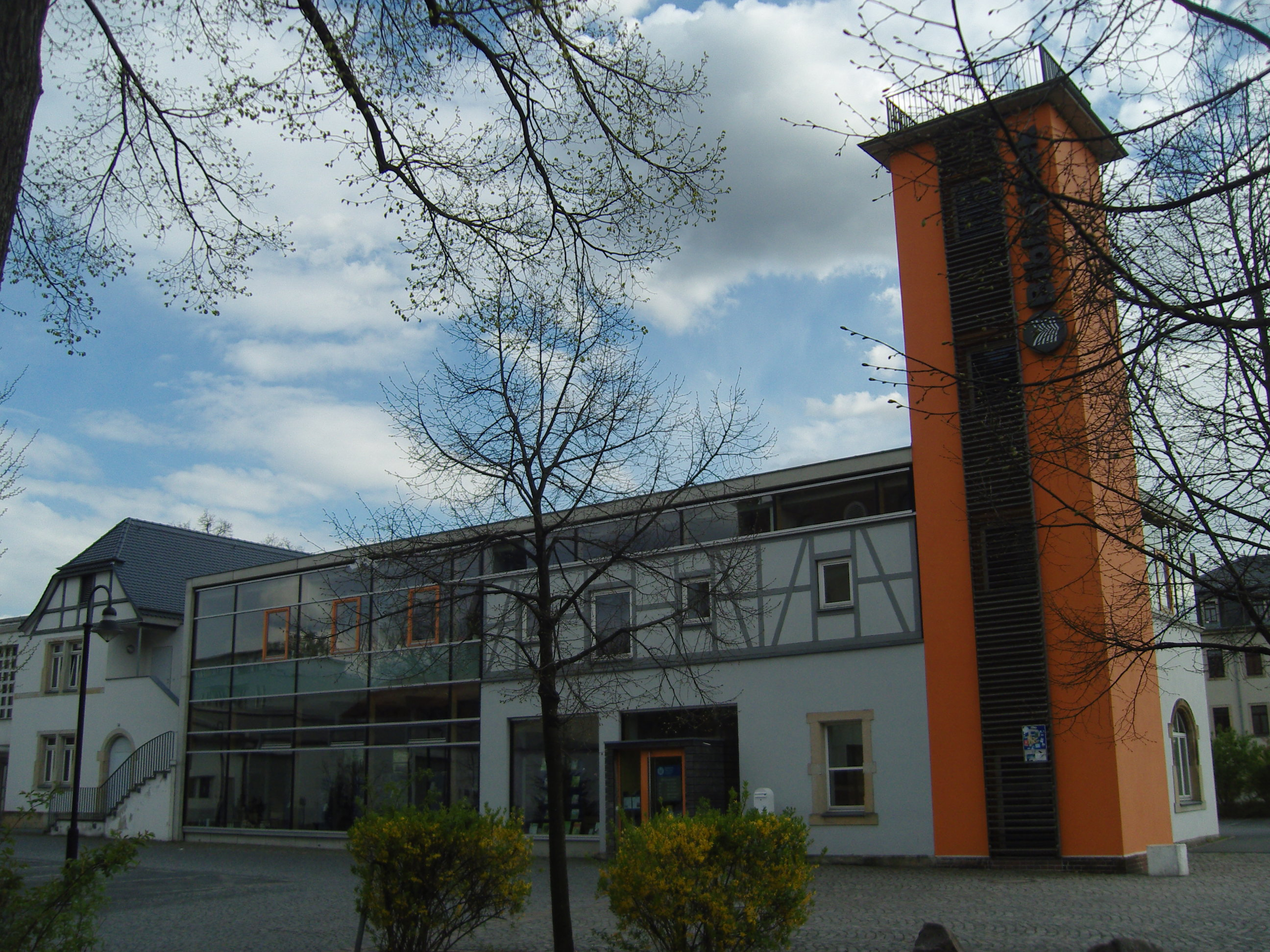 Denkmalgeschützte ehemalige Pieschener Feuerwache, heute Bibliothek in der Bürgerstraße 63 in Dresden-Pieschen